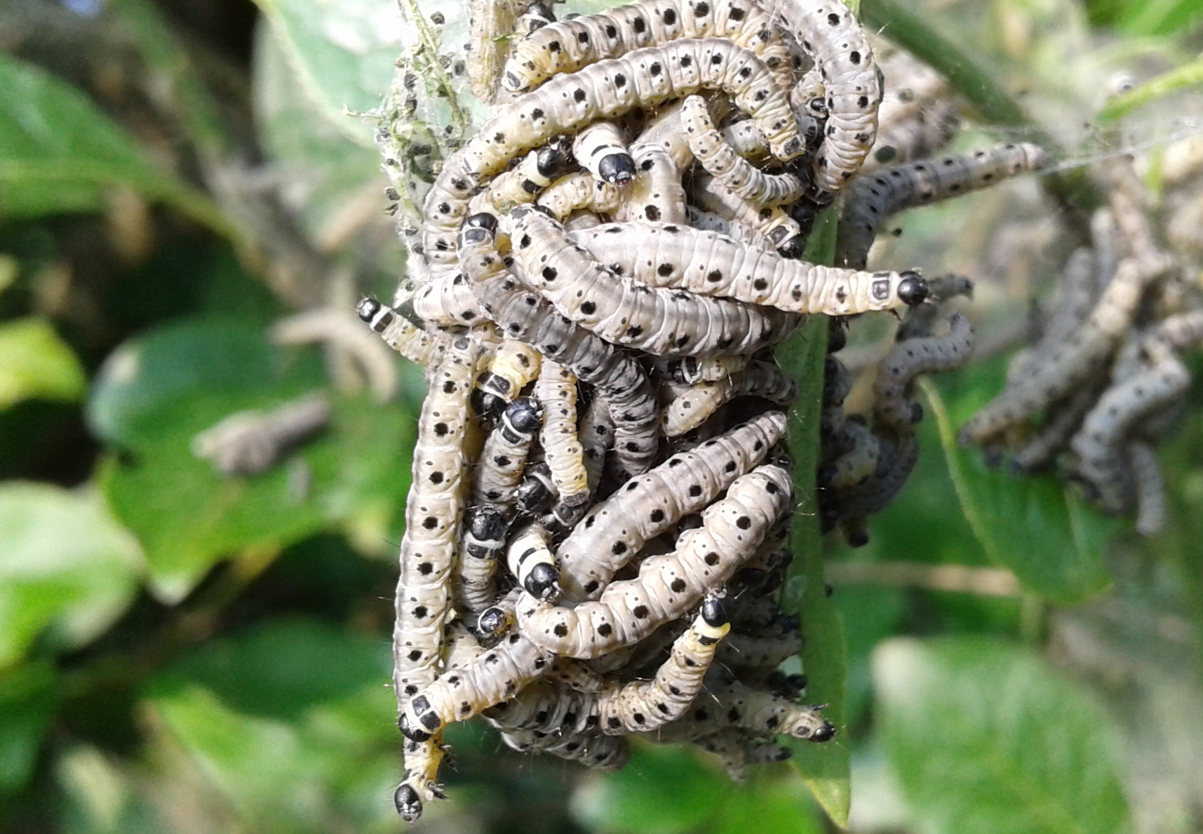 Chenilles Grand hyponomeute du fusain (Yponomeuta cagnagella) lieu France Nord, posture de défense